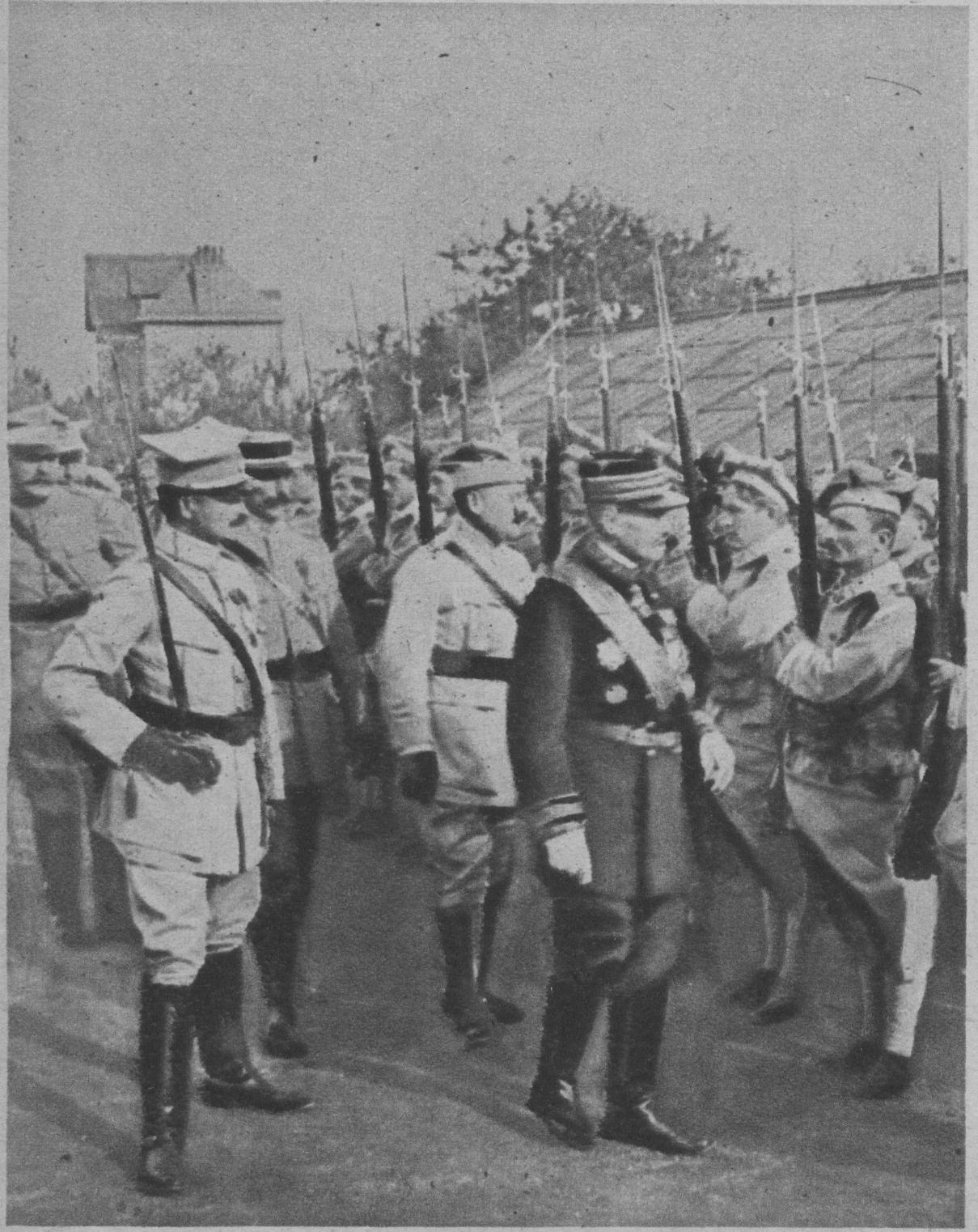 le Miroir N° 205, page 14 le régiment polonais se formant à Sillé le Guillaume et passé en revue par Archinard.